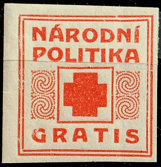 Специальная наклейка, фиксирующая оплату доставки журнала «Národní politika» (Чехословакия)